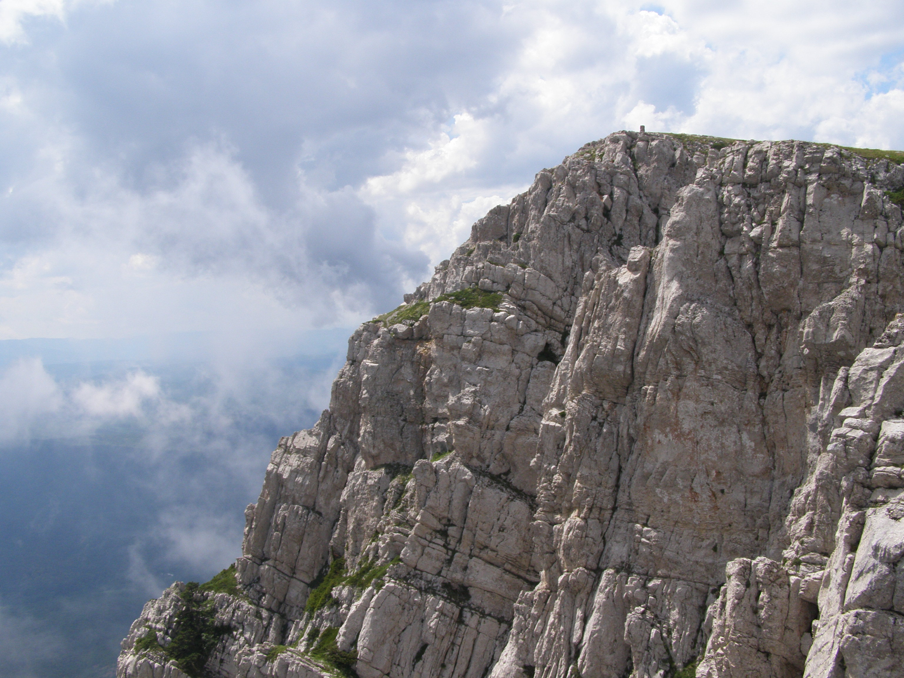 Eklizi-Burun-peak on Chatyr-Dah-plateau, Crimean Mountains